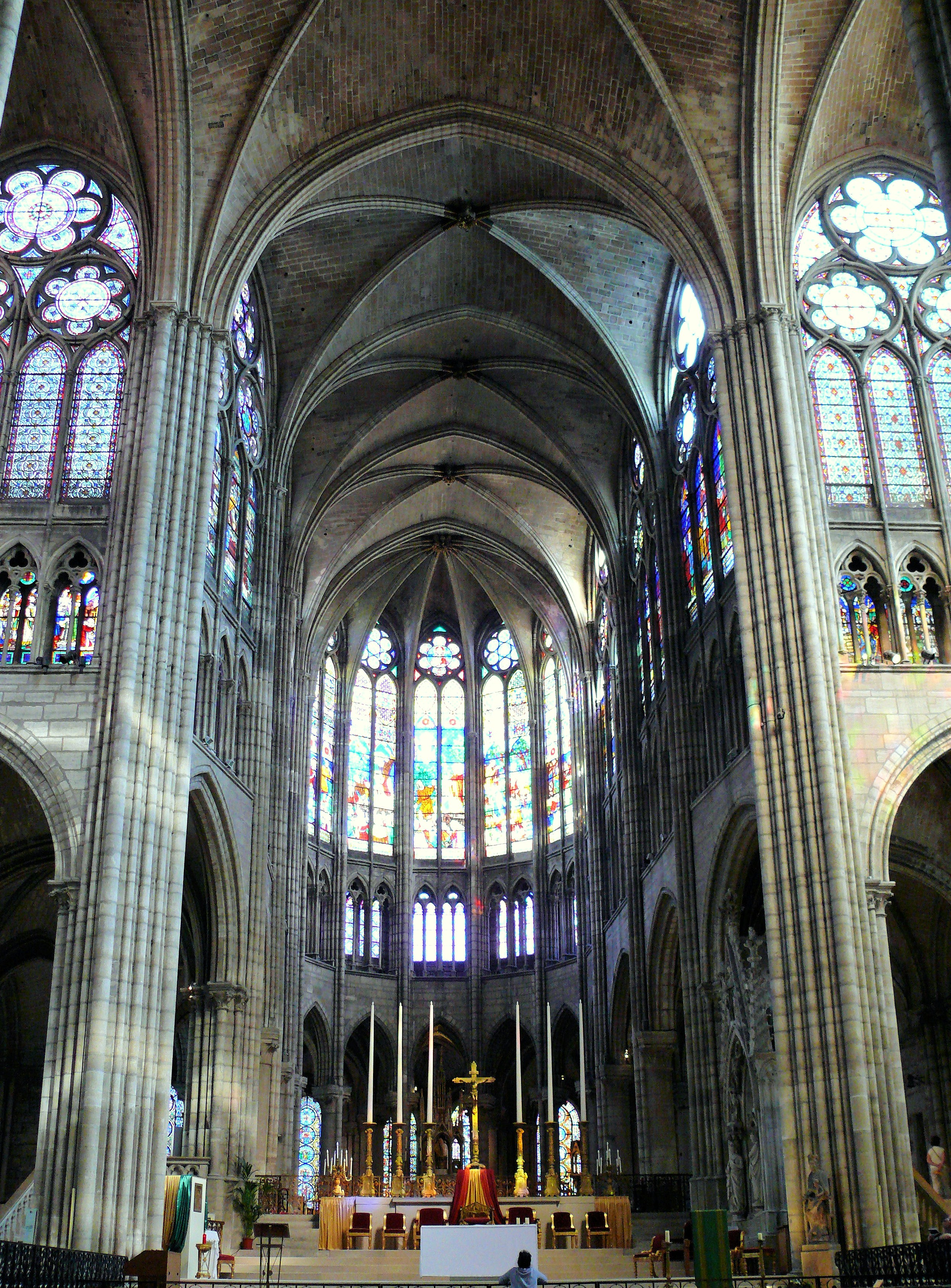 Saint-Denis - Basilique - Choeur